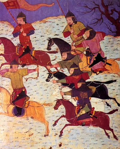 Mongolske bueskyttere til hest. Illustrasjon fra et manuskript fra tidlig 1300-tall.